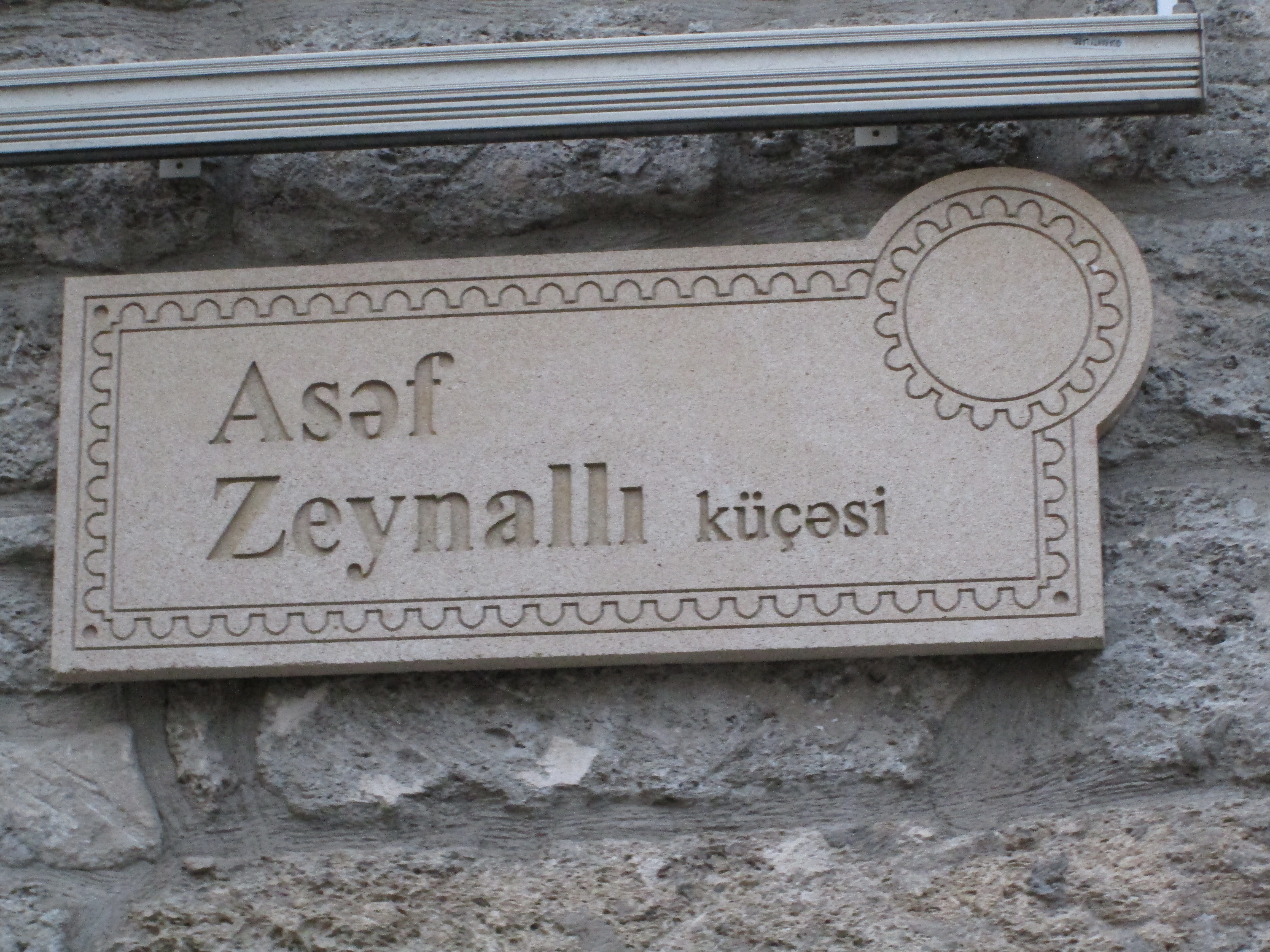 Asəf Zeynallı məlumat lövhəsi